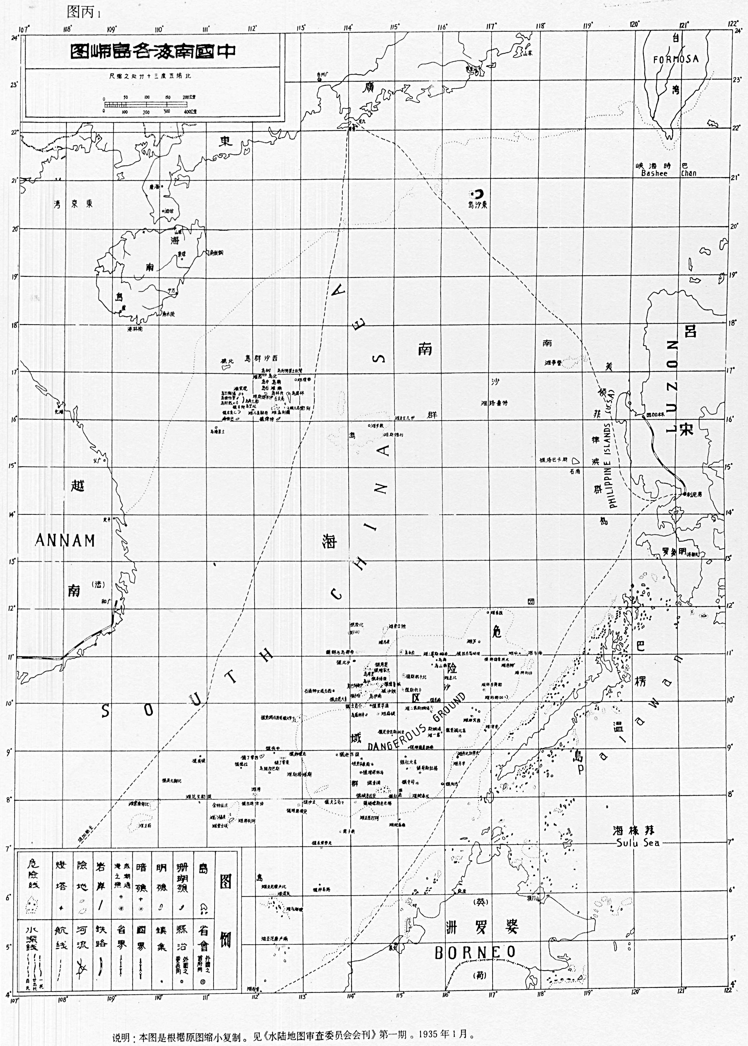 carte des îles chinoises dans la mer de Chine méridionale (Zhongguo nanhai ge daoyu tu - 中國南海各島嶼圖)